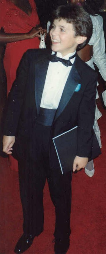 Fred Savage, 1989